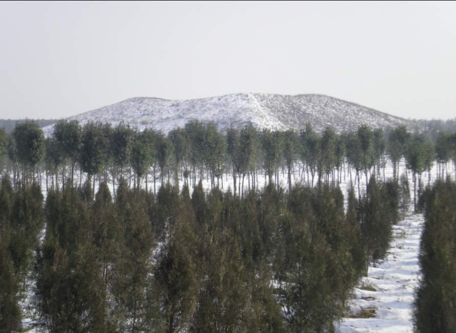 张嫣皇后墓位于汉惠帝刘盈安陵的东北侧